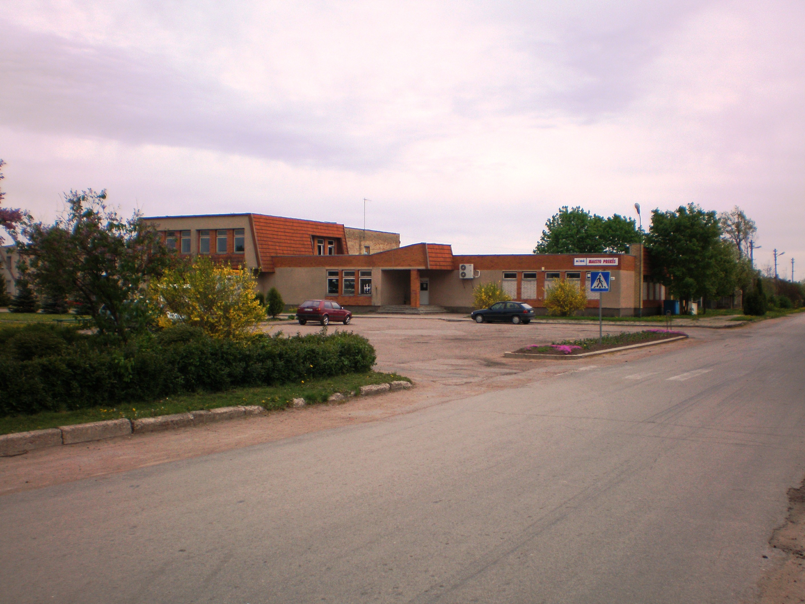 Gudžiūnai, Kėdainių raj.